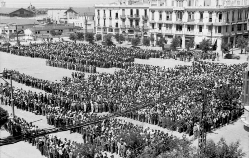 Scherl; Griechenland: In Übereinstimmung zwischen den deutschen und griechischen Stellen werden jetzt die Juden in Griechenland erfasst und einer nutzbringenden Arbeit zugeführt. Kriegsberichter Dick, Juli 1942